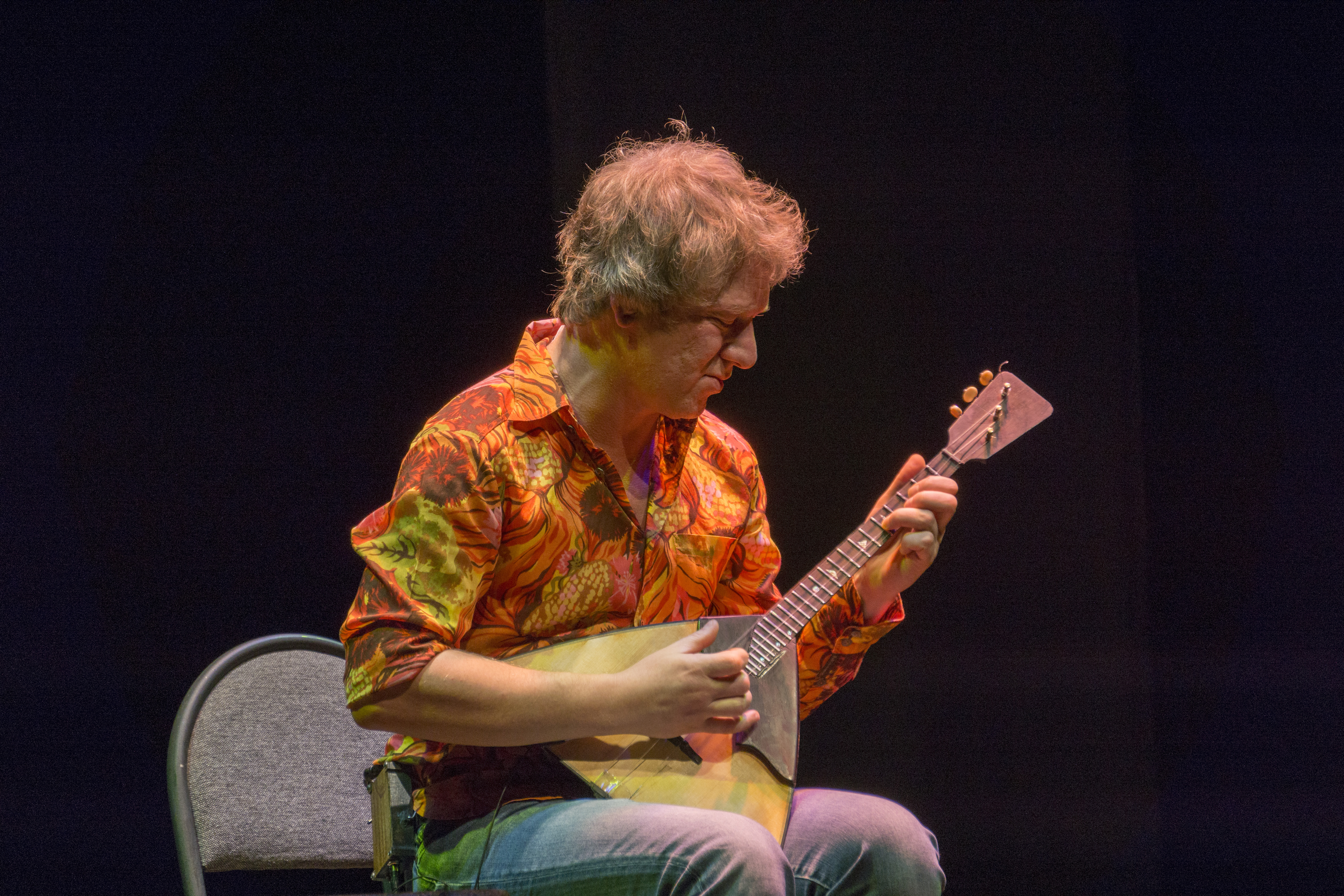 Балалаечник Алексей Архиповский на концерте в Тольятти